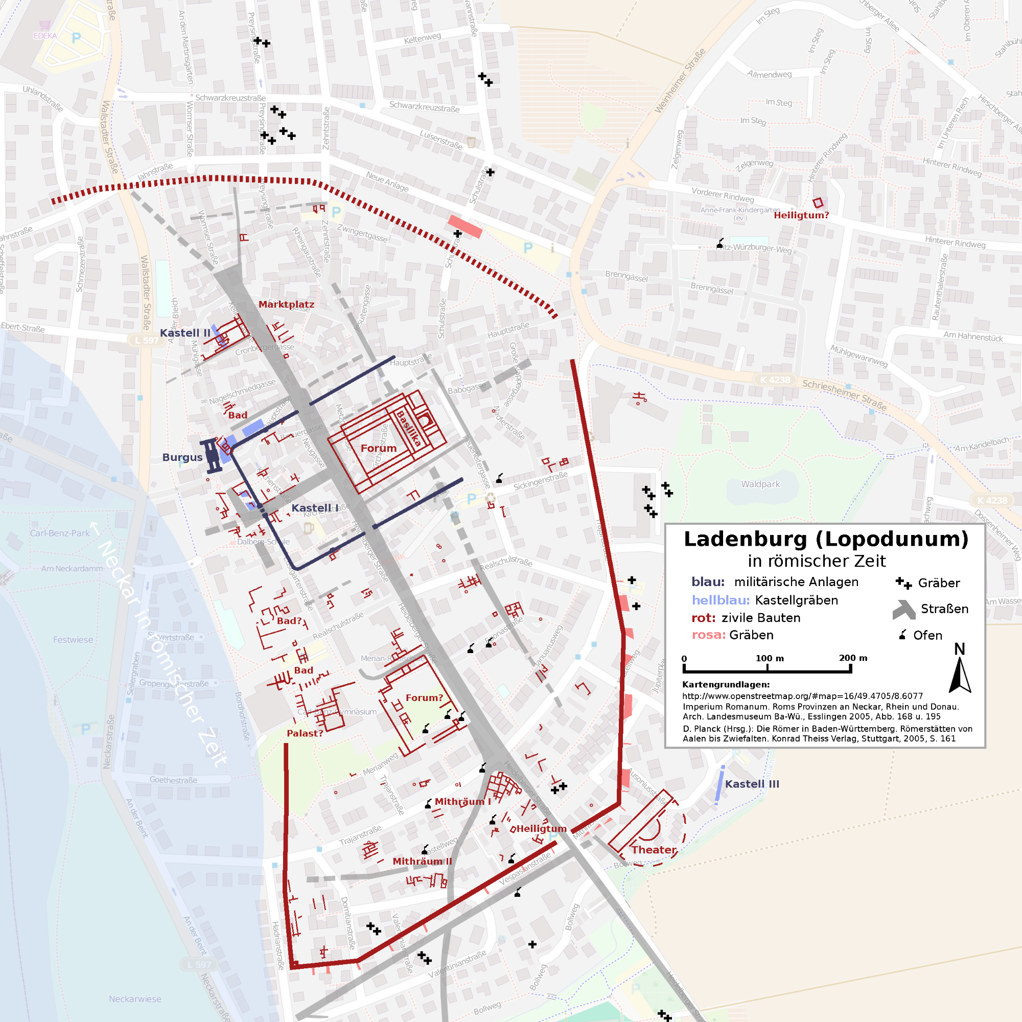 Lopodunum].